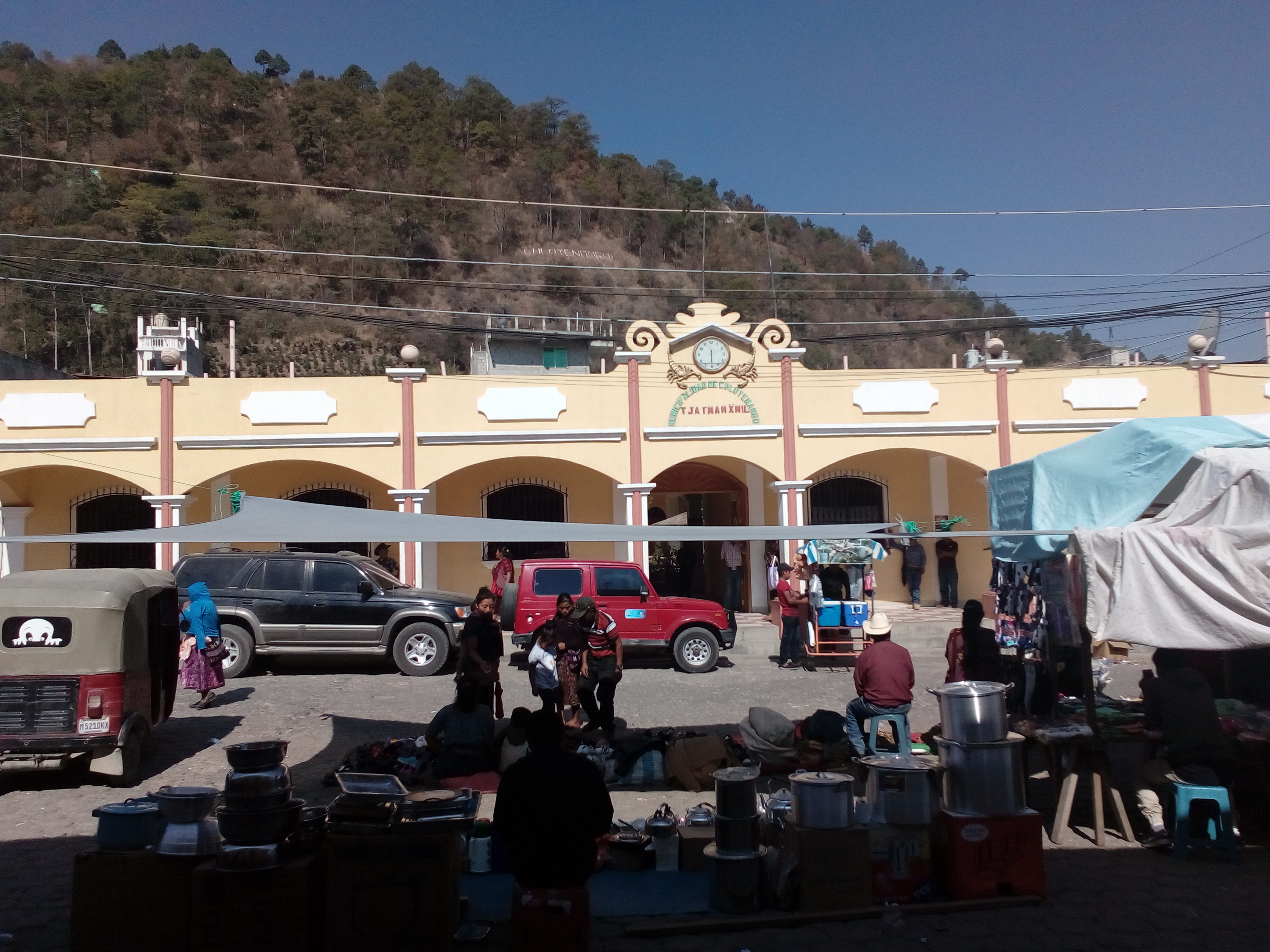 Municipalidad de Colotenango, Huehuetenango